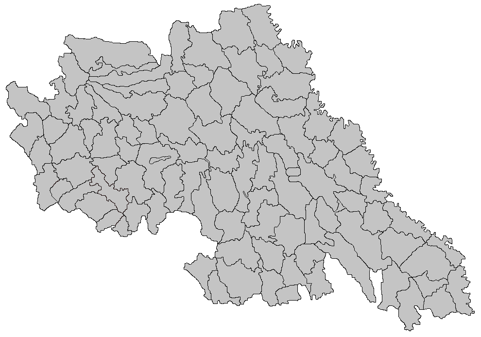 Categorie:Hărţi ale judeţului Iaşi